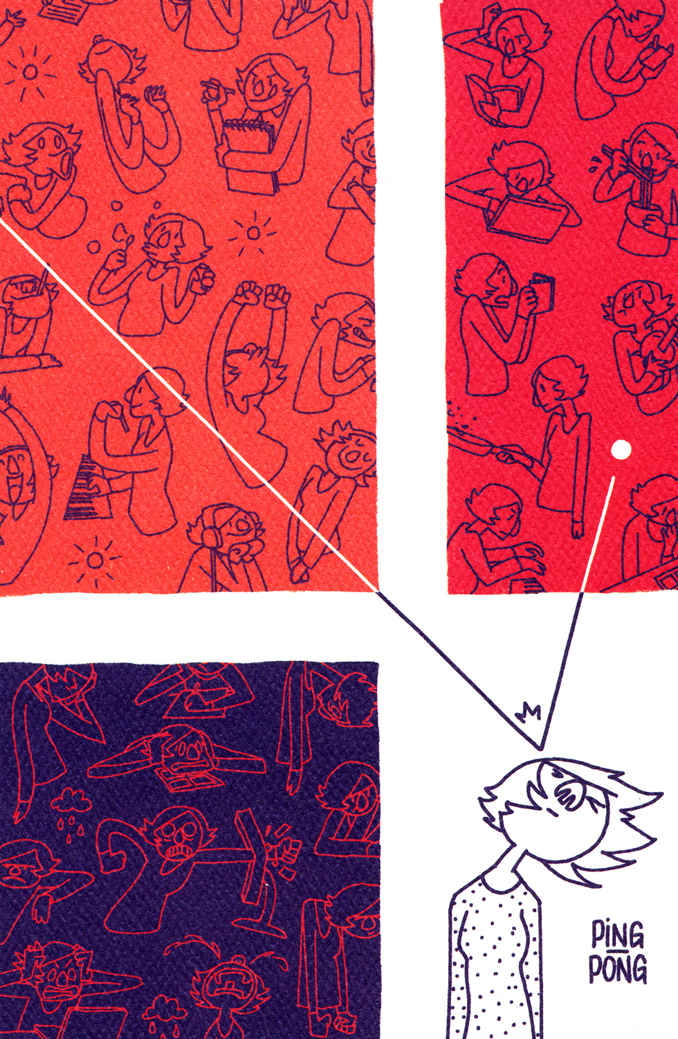 Couverture du livre Ping-pong de Zviane, première éditionZviane, Ping-pong, édité par Zviane, 2014, 152 pages, ISBN 978-2-924054-05-5